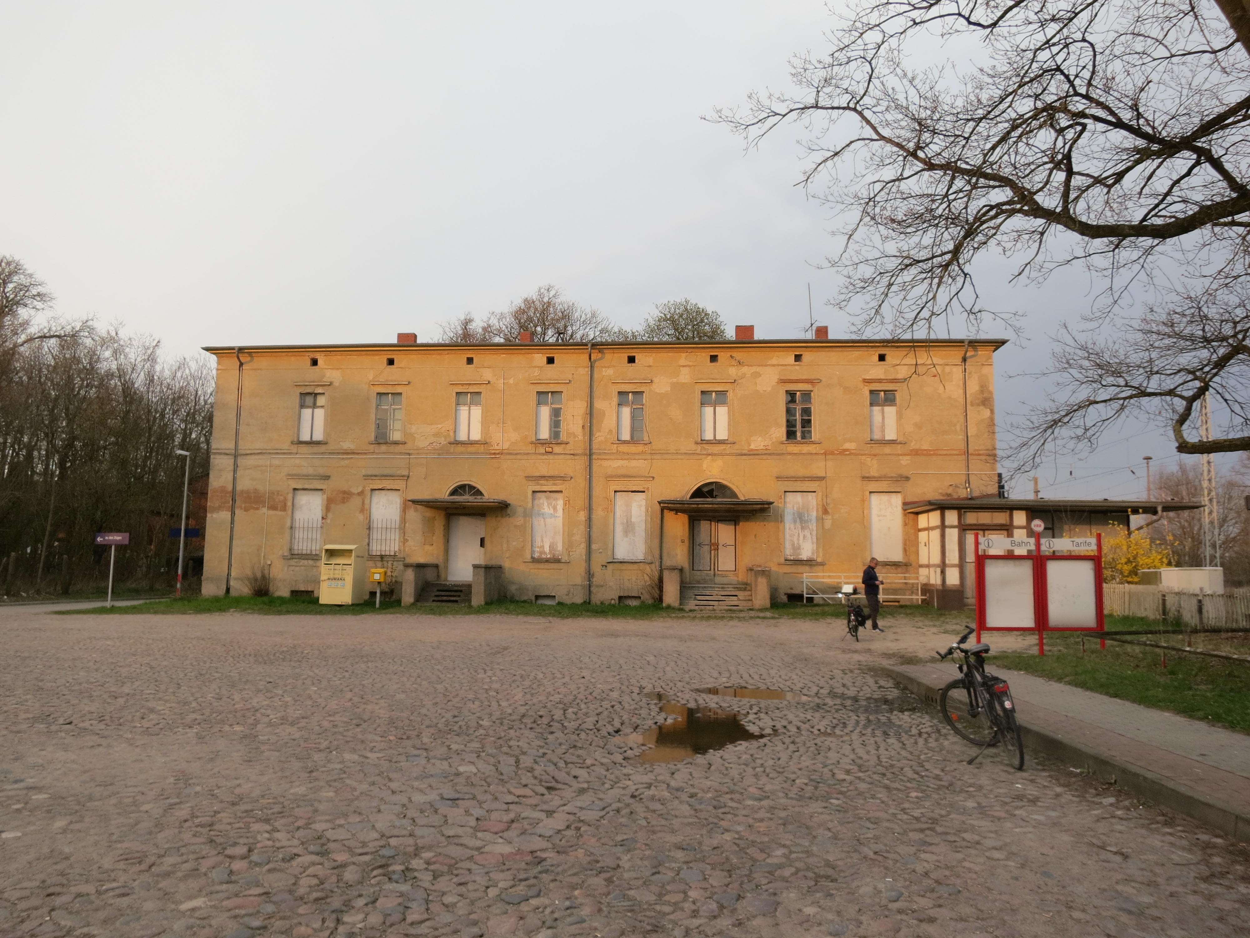 Bf Passow (Uckermark), Vorplatz